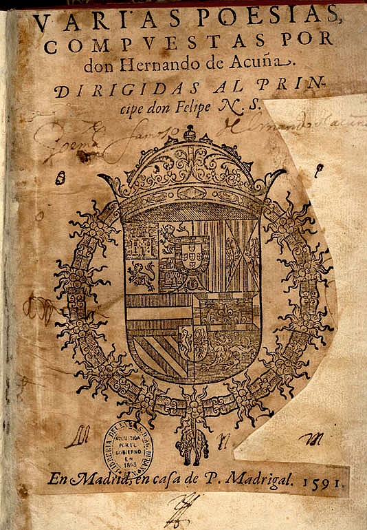 Varias Poesías de Hernando de Acuña (1520-1580).